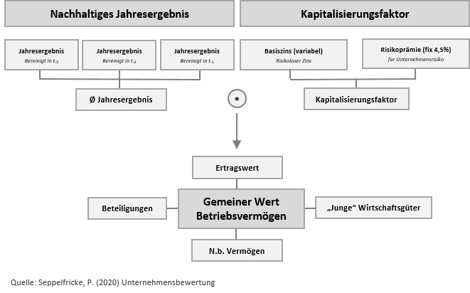 Komponenten des vereinfachten Ertragwertverfahrens